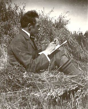 Enligt uppladdaren tagen på 1930-talet.